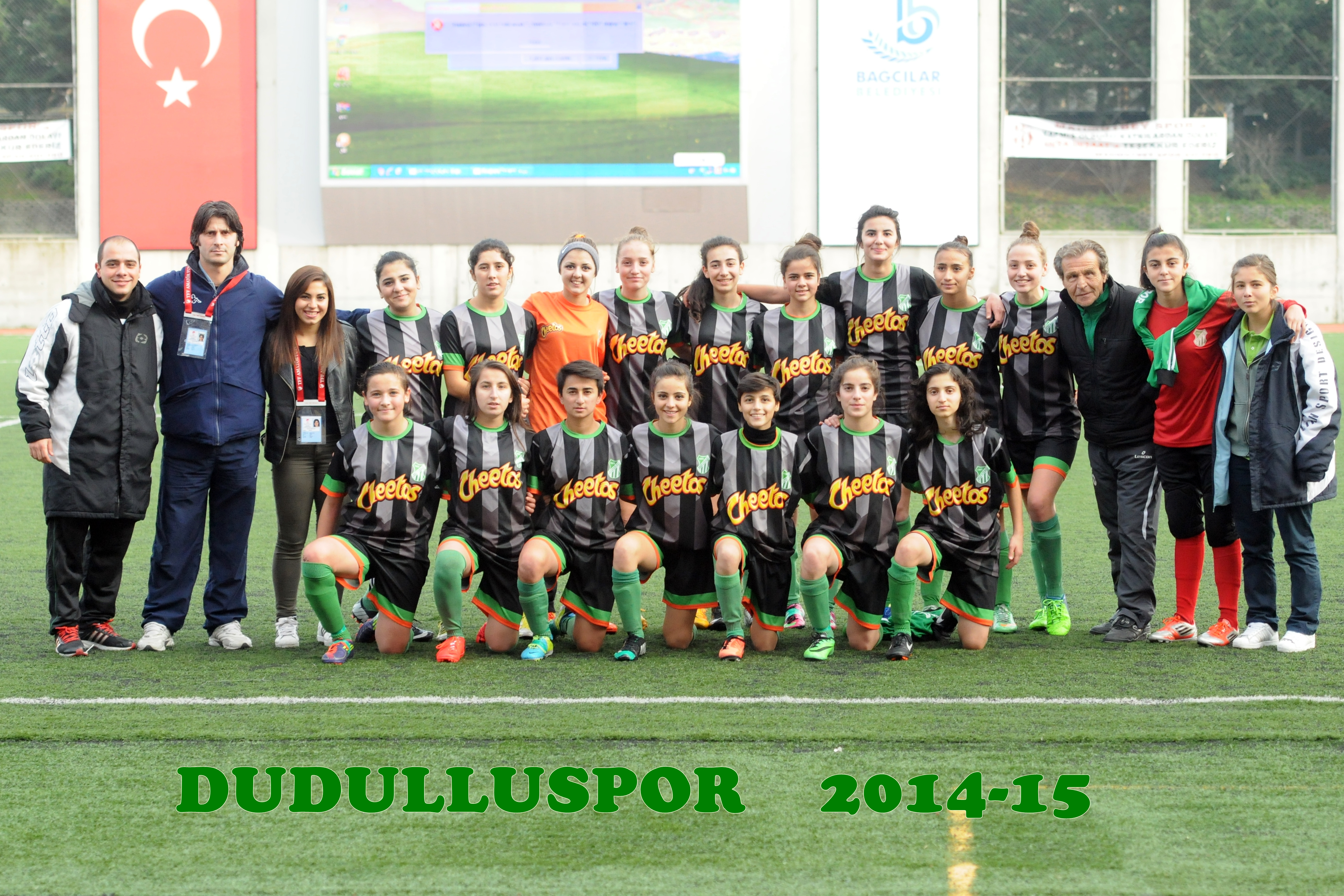 Dudulluspor a-takım